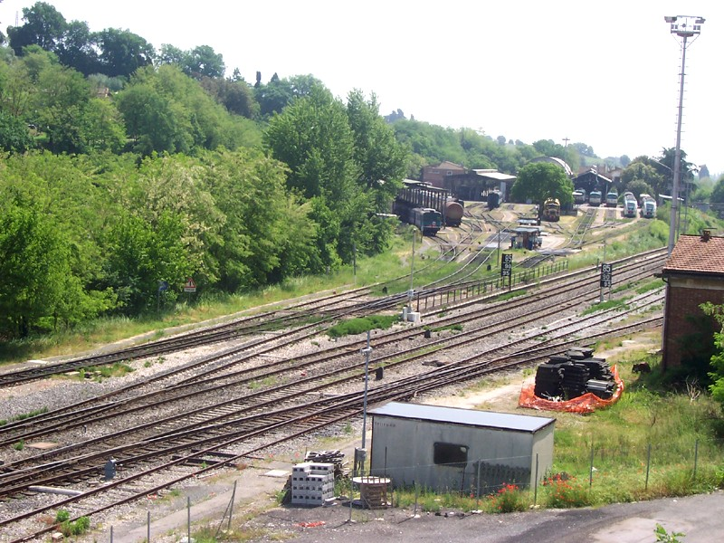 Siena - Deposito della Stazione FS